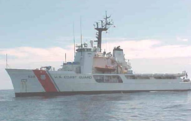 USCGC Dependable WMEC-626